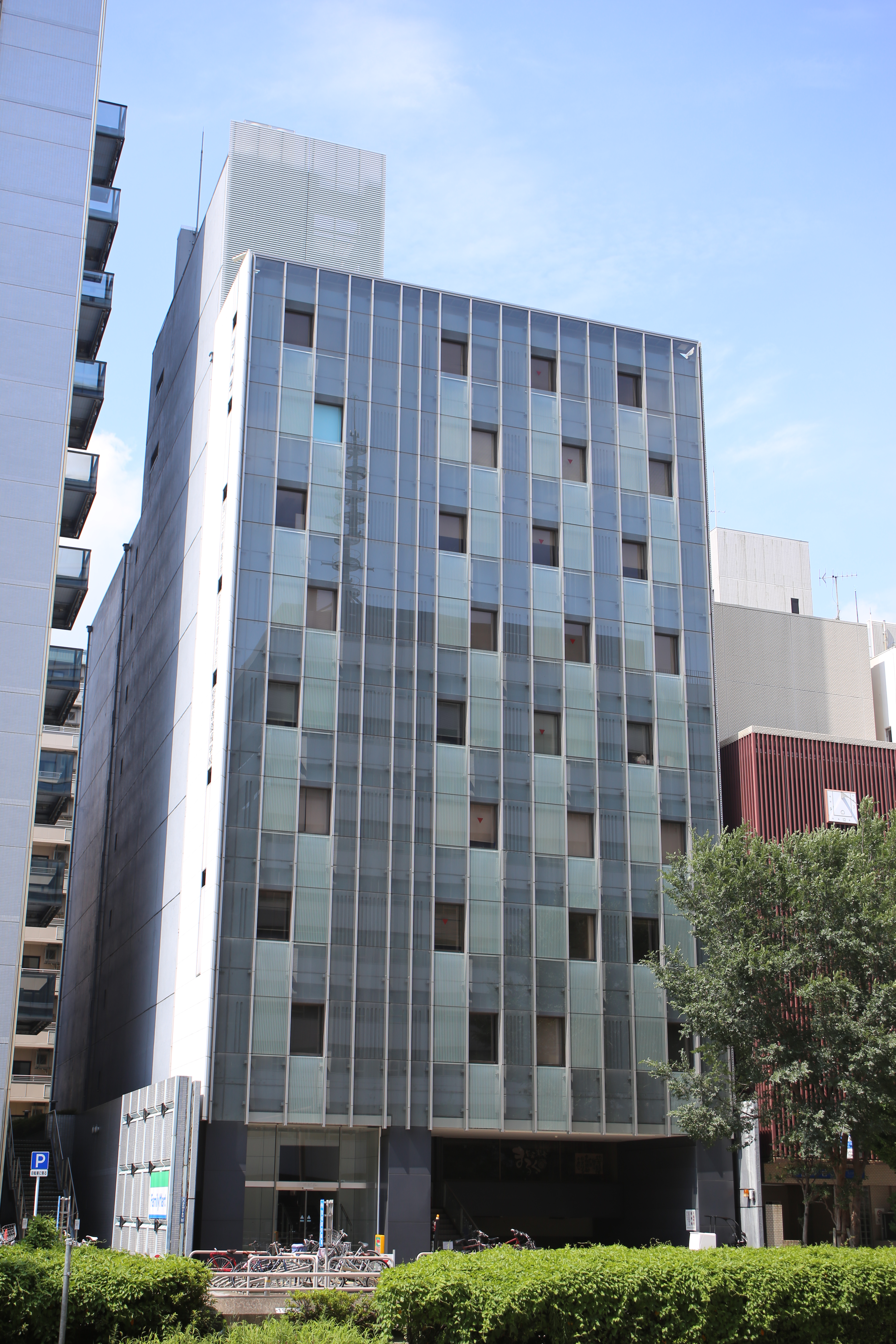 名古屋市中区丸の内二丁目 三博ビル